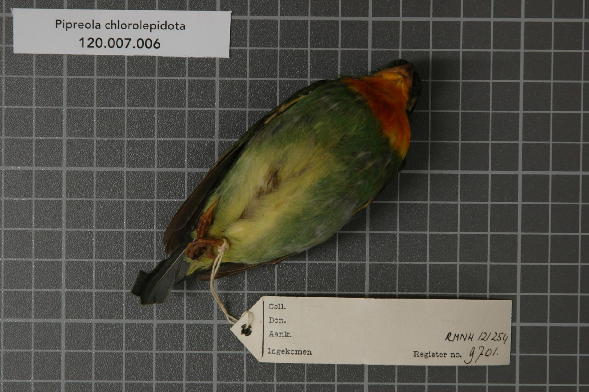 Pipreola chlorolepidota Swainson, 1837